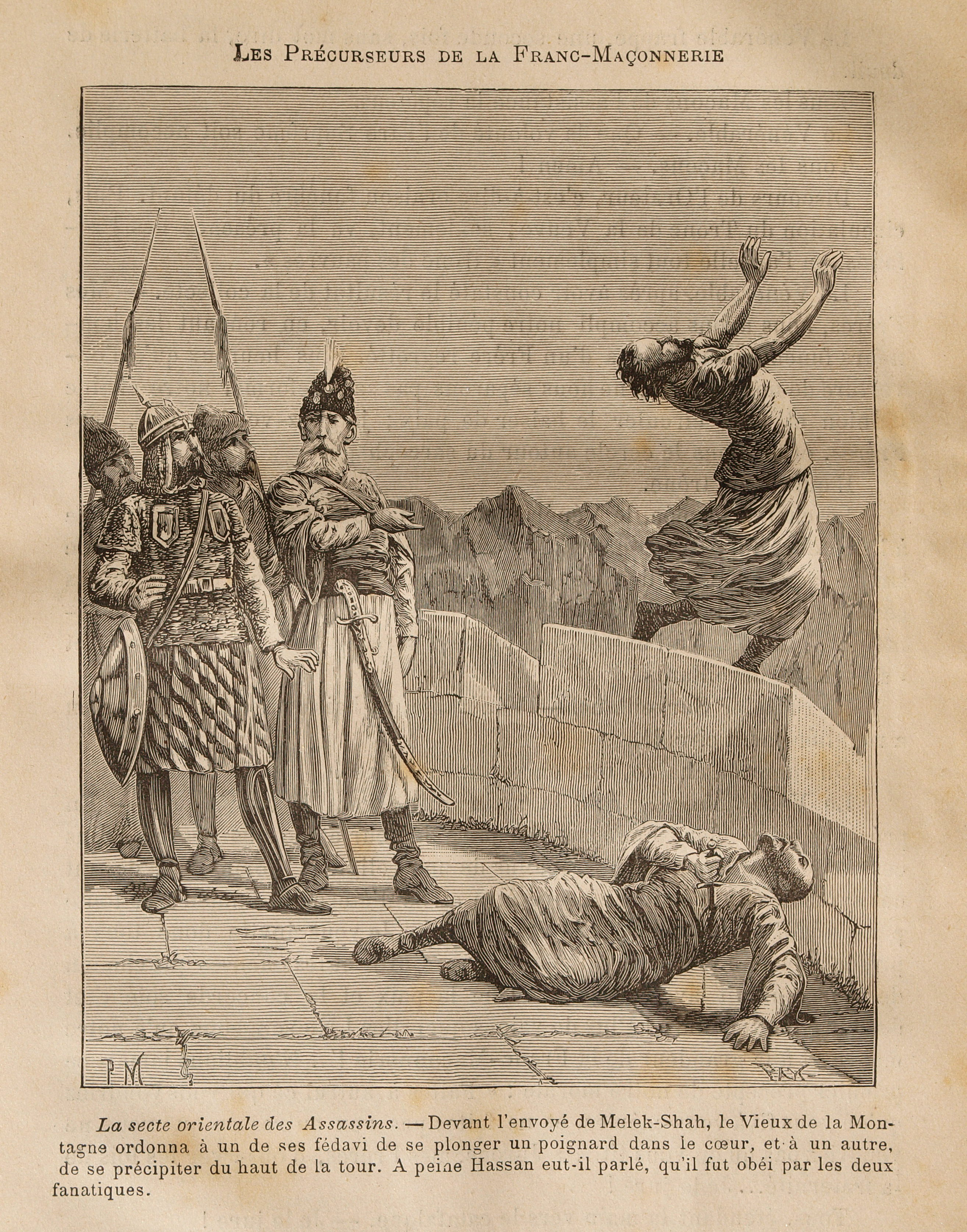 Une des gravures du document de Léo Taxil, Les Mystères de la Franc-Maçonnerie, Paris, 1886.